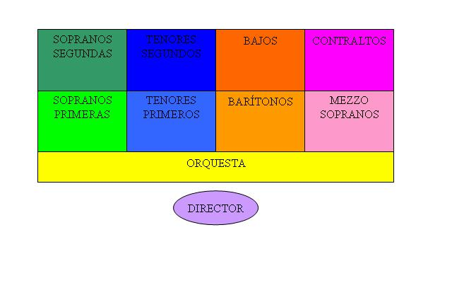 Distribución orquestal de masa coral